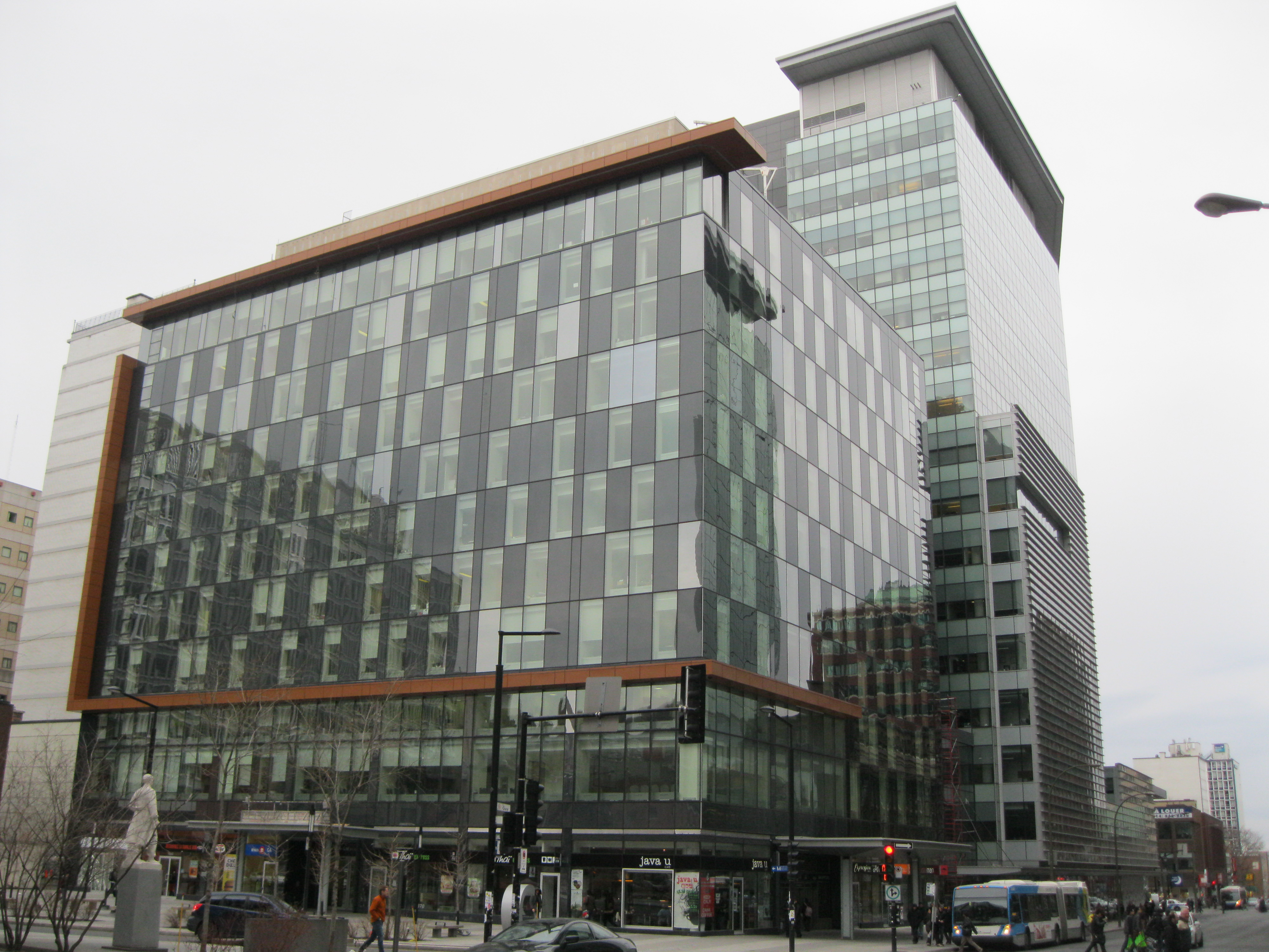 Engineering, Computer Science and Visual Arts Integrated Complex, Concordia University, Montreal